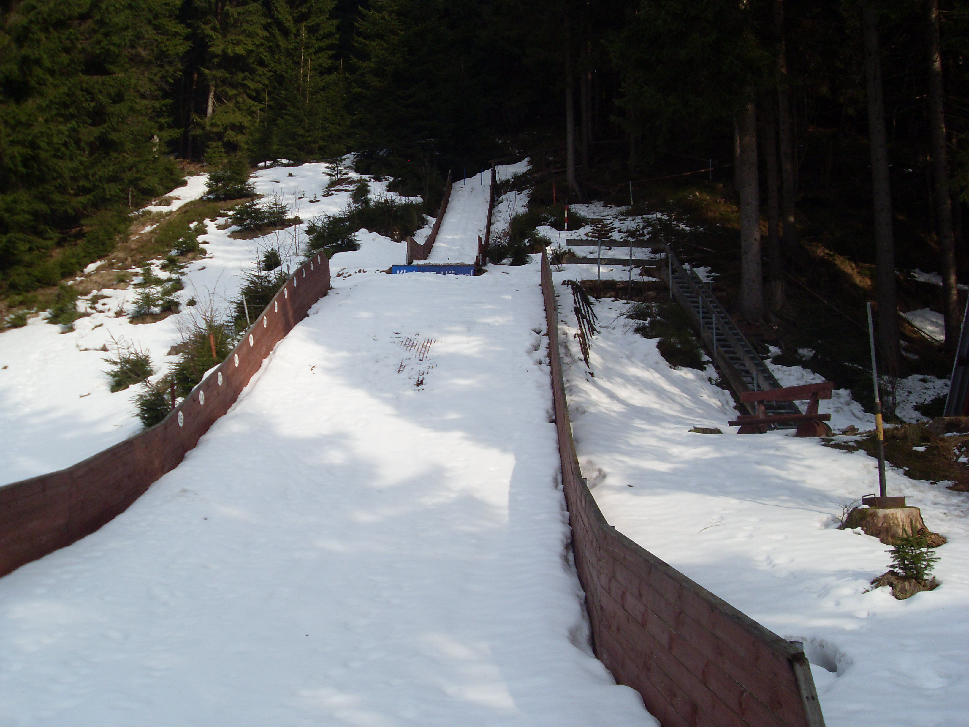 Wadebergschanze K13 in Oberhof, Germany. Original description: auch die Kleinsten dürfen schon üben